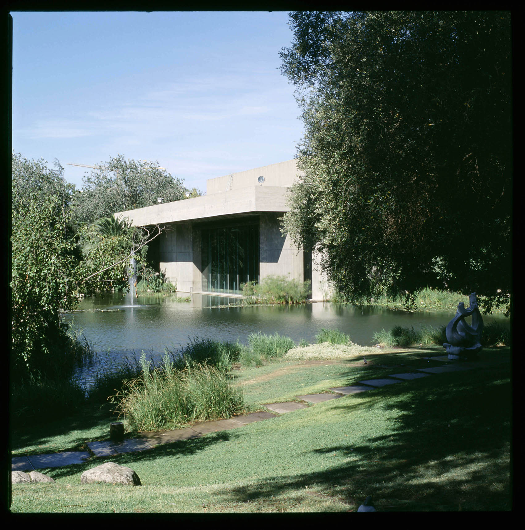 Arquitectos responsáveis: Gonçalo Ribeiro Telles, António Barreto Viana. Fotógrafo: Manuel Silveira Ramos. Data de produção da fotografia original: 2002-2003. CFT169.595.ic